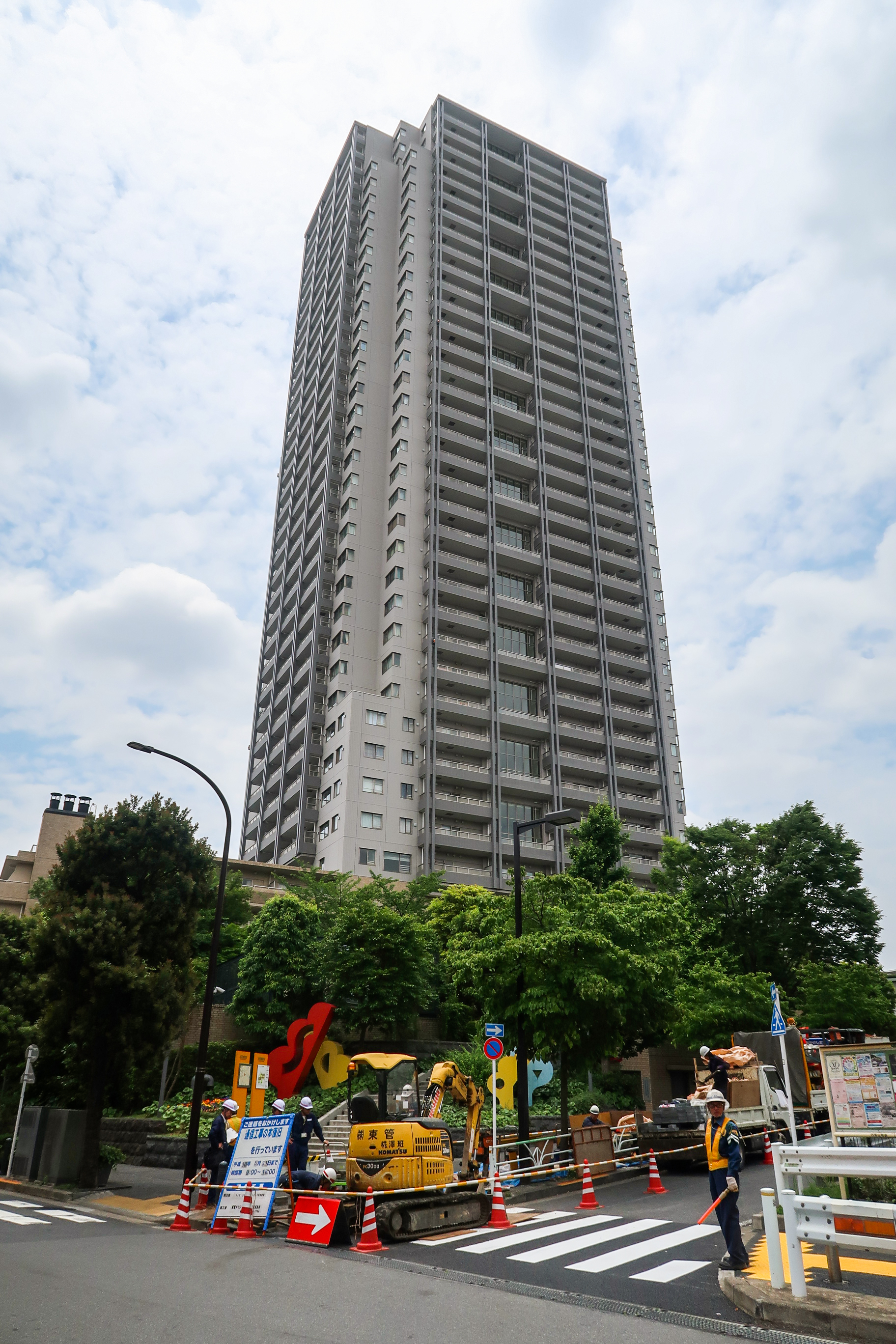 Daikanyama Address